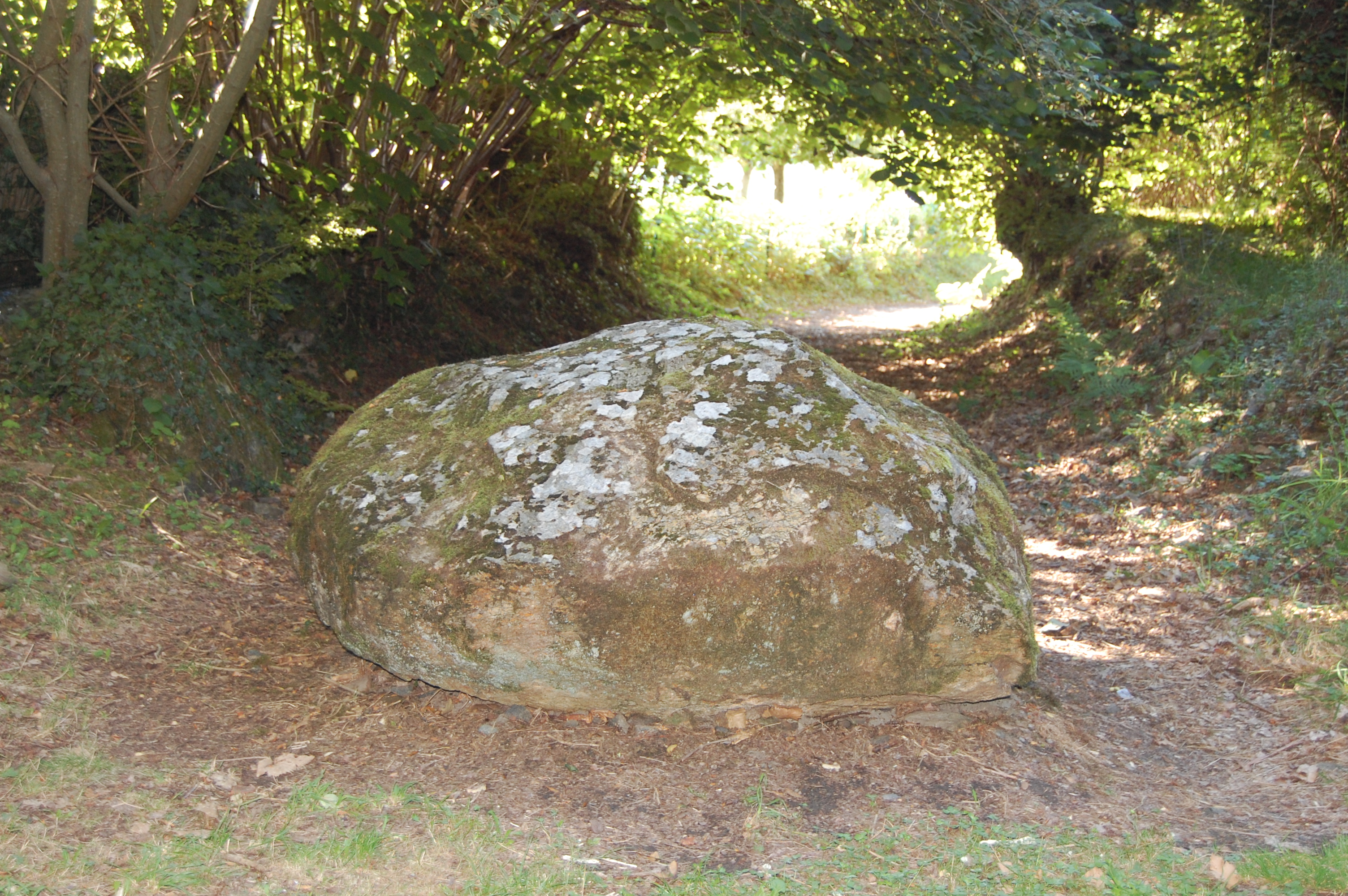 mégalithe à proximité du château de Châlus Chabrol